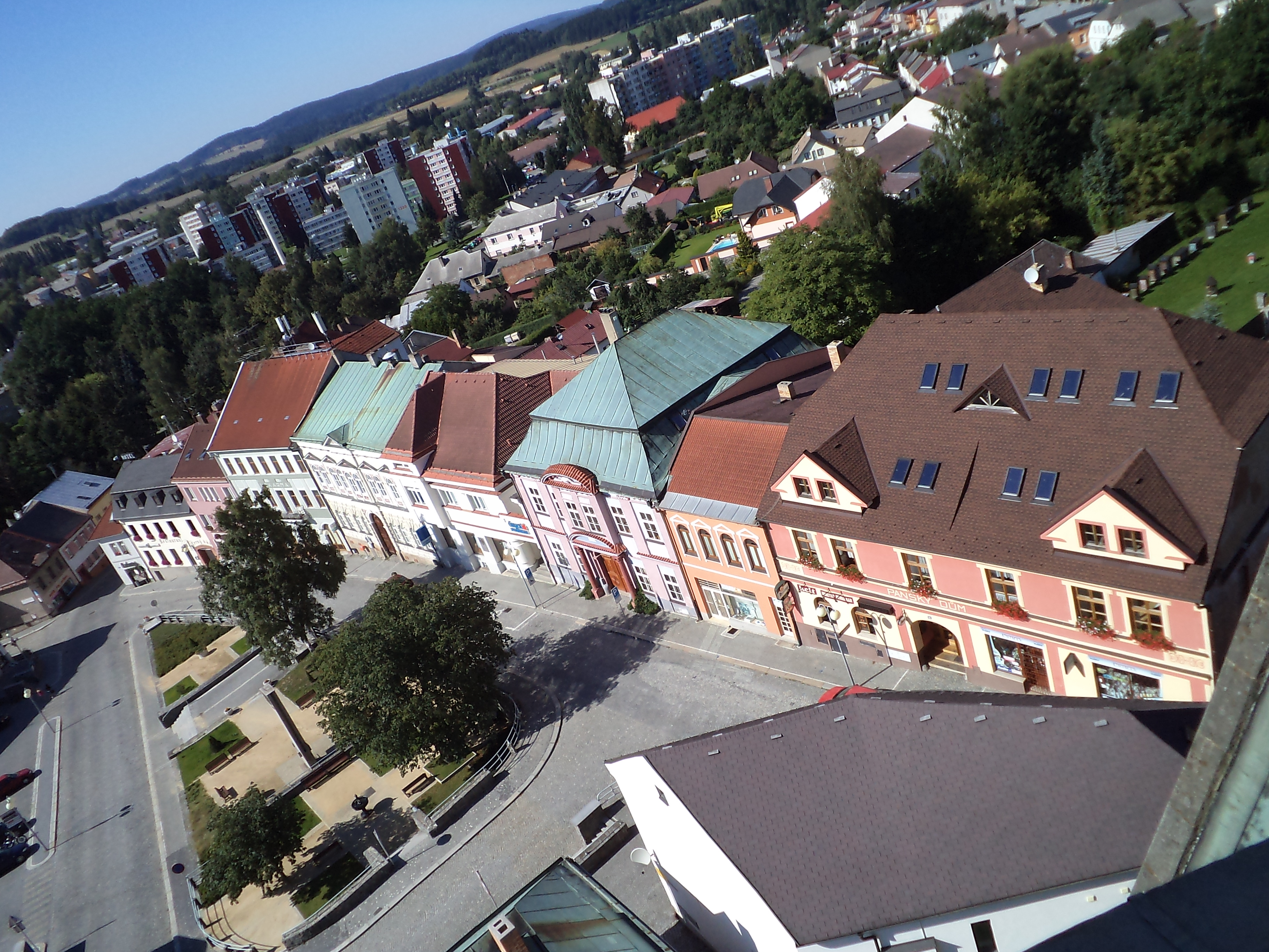 Radnice (Humpolec), nám. Dolní 250, Humpolec